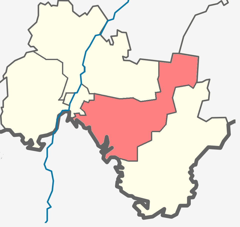 Пчевжинское СП на карте Киришского района Ленинградской области